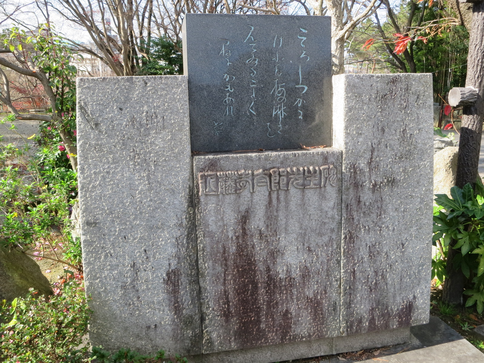 岡崎市東公園内の世尊寺にある近藤孝太郎の歌碑